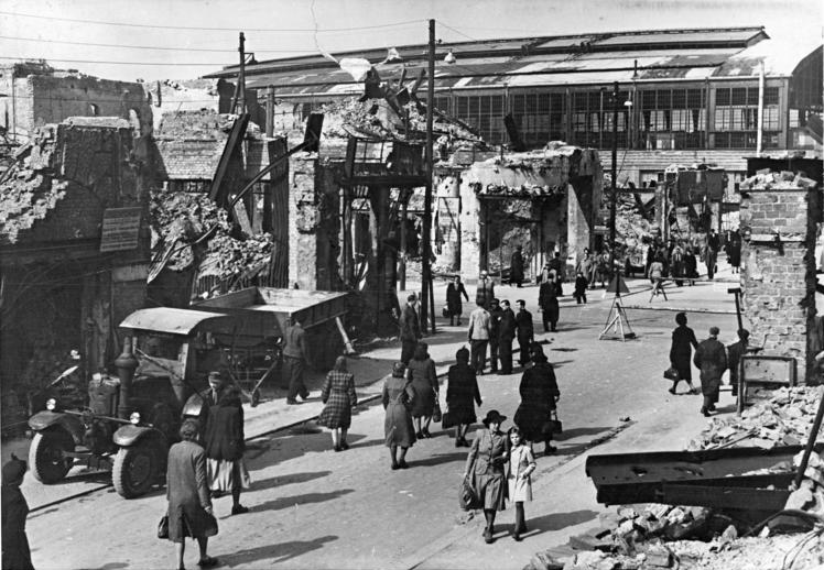 Berlin, Friedrichstraße, S-Bahnhof, Trümmer Berlin 1950 Generalreinigung in der Friedrichstrasse Die Abrißarbeiten der Trümmer in der Friedrichstrasse in Berlin, angefangen von Unter den Linden bis zum S-Bahnhof Friedrichstrasse, sind in vollem Gange. UBz: Aufräumarbeiten in der Friedrichstrasse. Zentralbild-Rudolph Ho. 27.3.1950